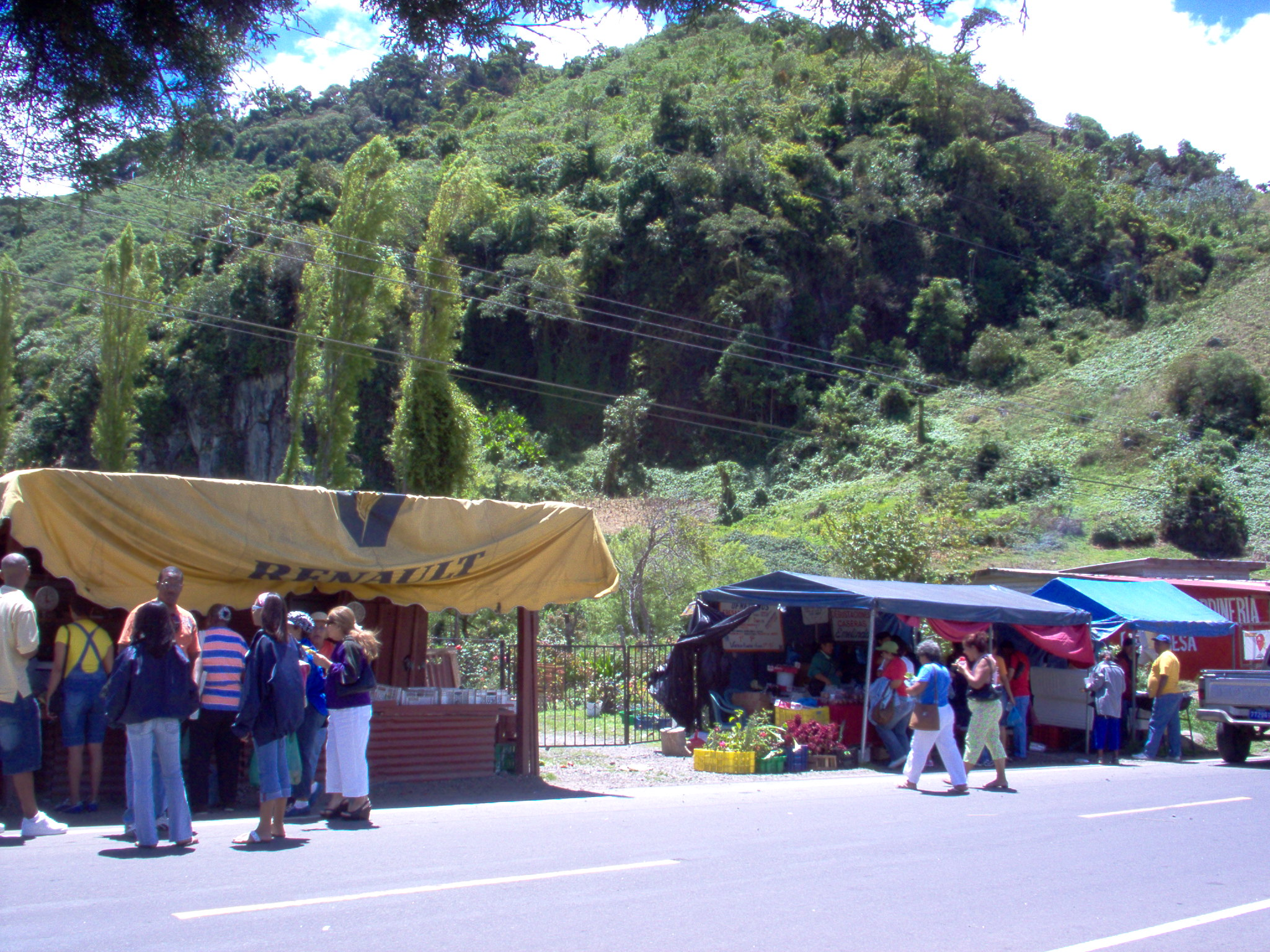 Mercados en la localidad de Cerro Punta, Chiriquí, Panamá. Foto tomada personalmente.